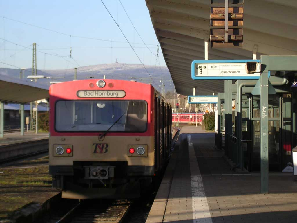 Die Taunusbahn in Bad Homburg vor der Höhe, im Hintergrund der Große Feldberg.